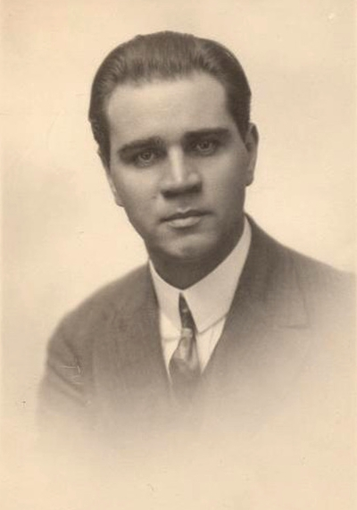 Евальд Аав - естонський композитор (1900-1939).